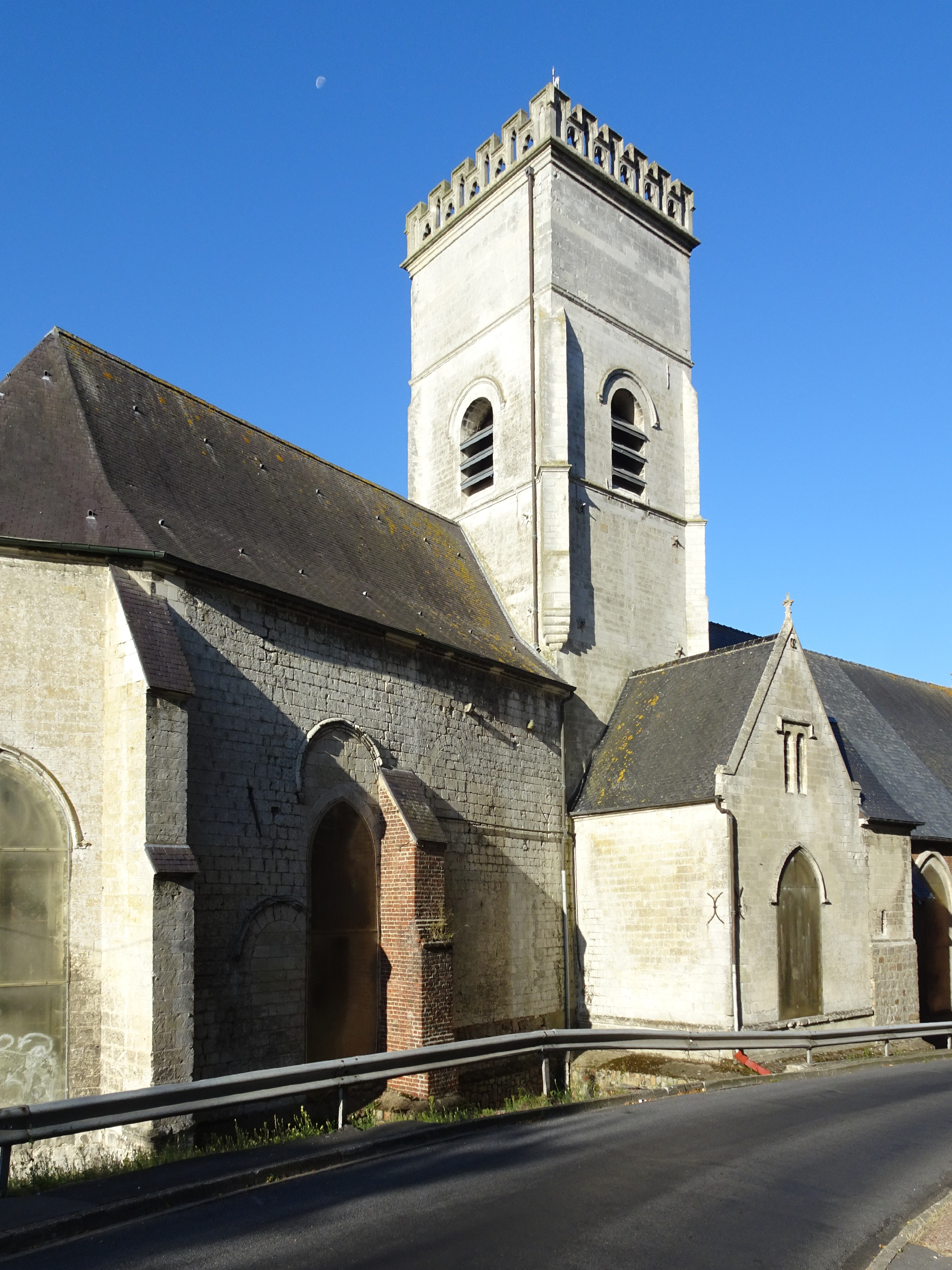 L'église Saint-Jean-Baptiste, partiellement détruite lors des guerres des xive et xve siècles, elle sera reconstruite et agrandie à la fin du xve siècle Houdain.